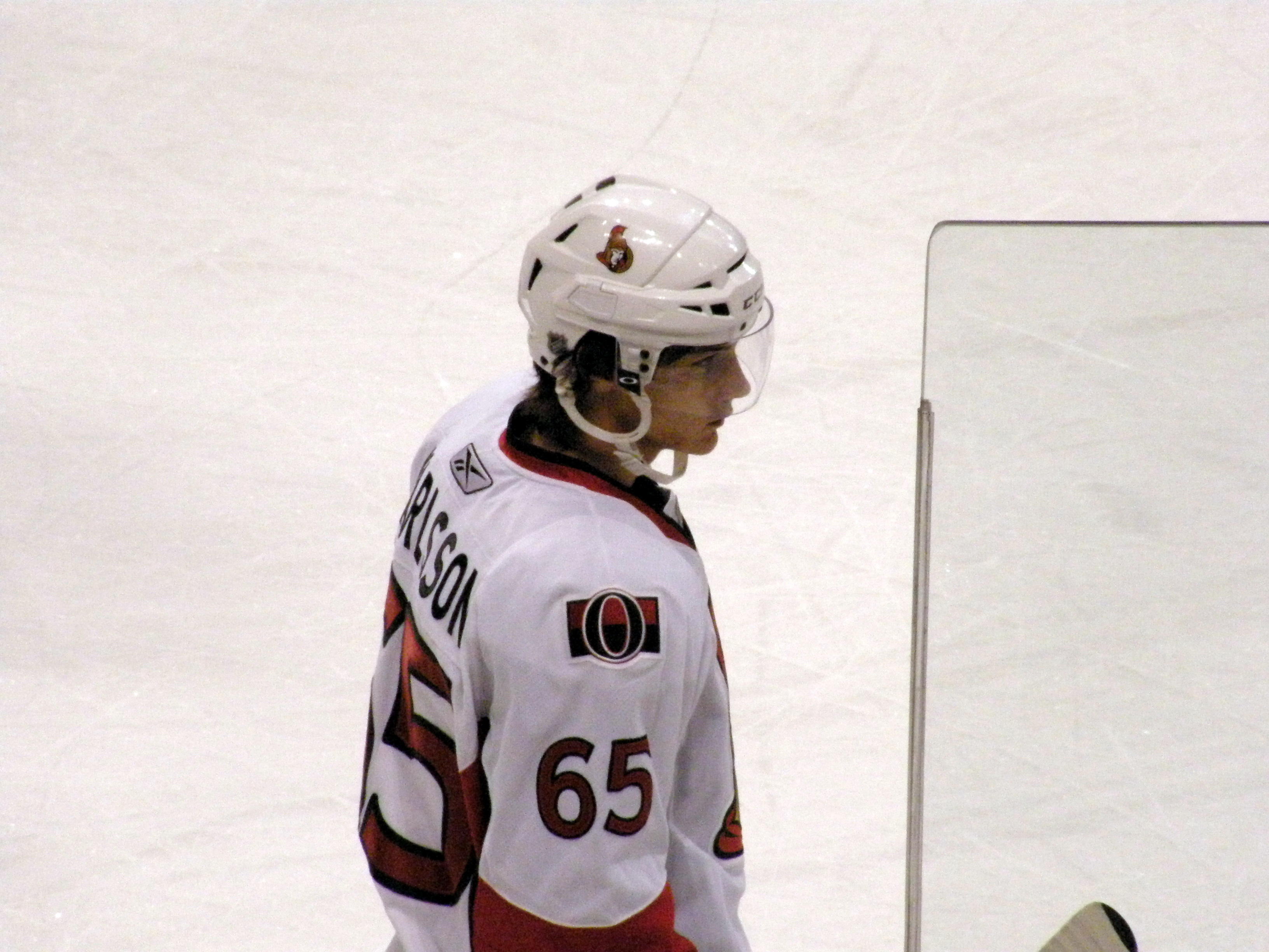 Erik Karlsson (D, OTT)